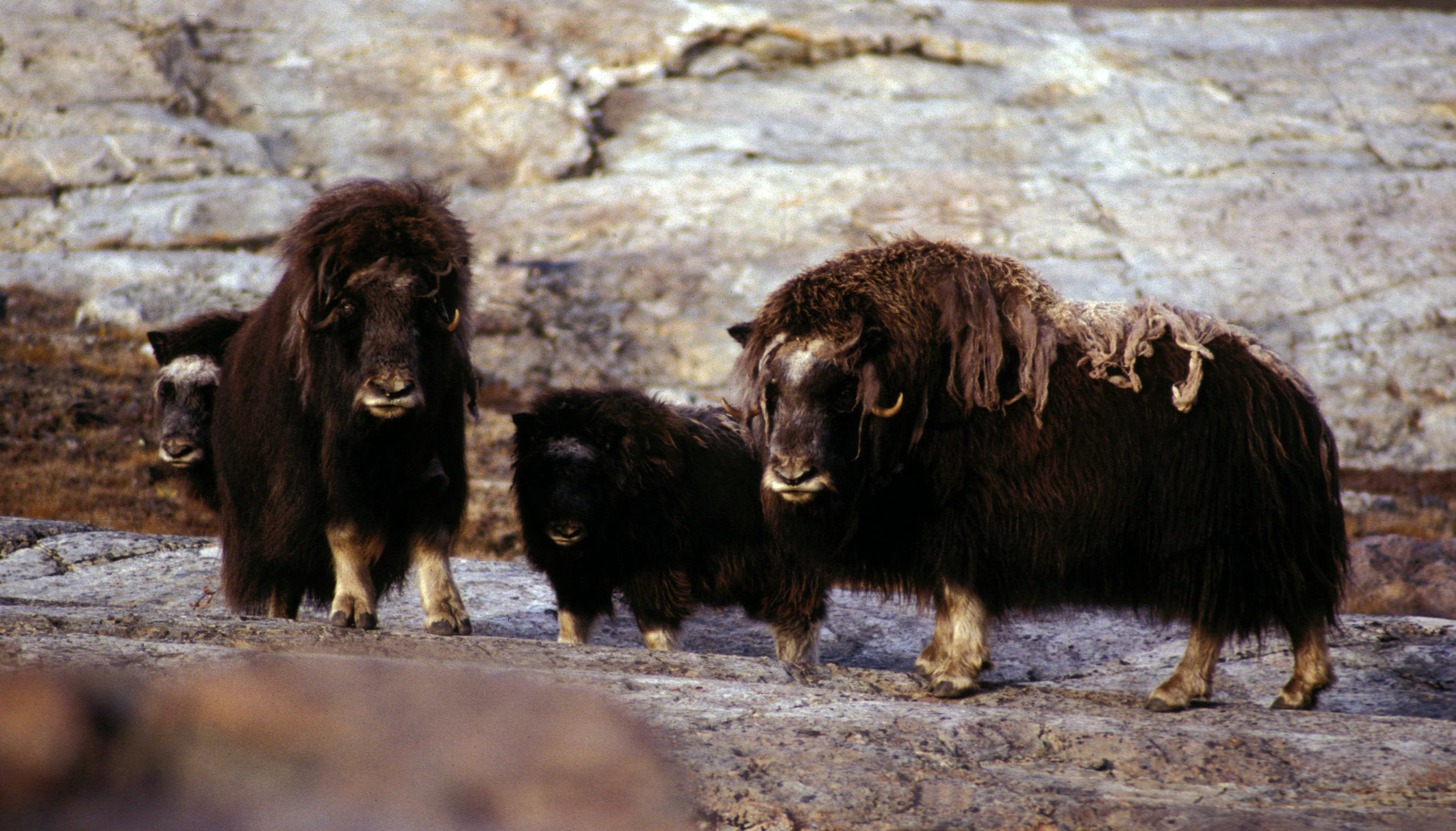 Musk Ox, Kong Oscar Fjord area, NE Greenland